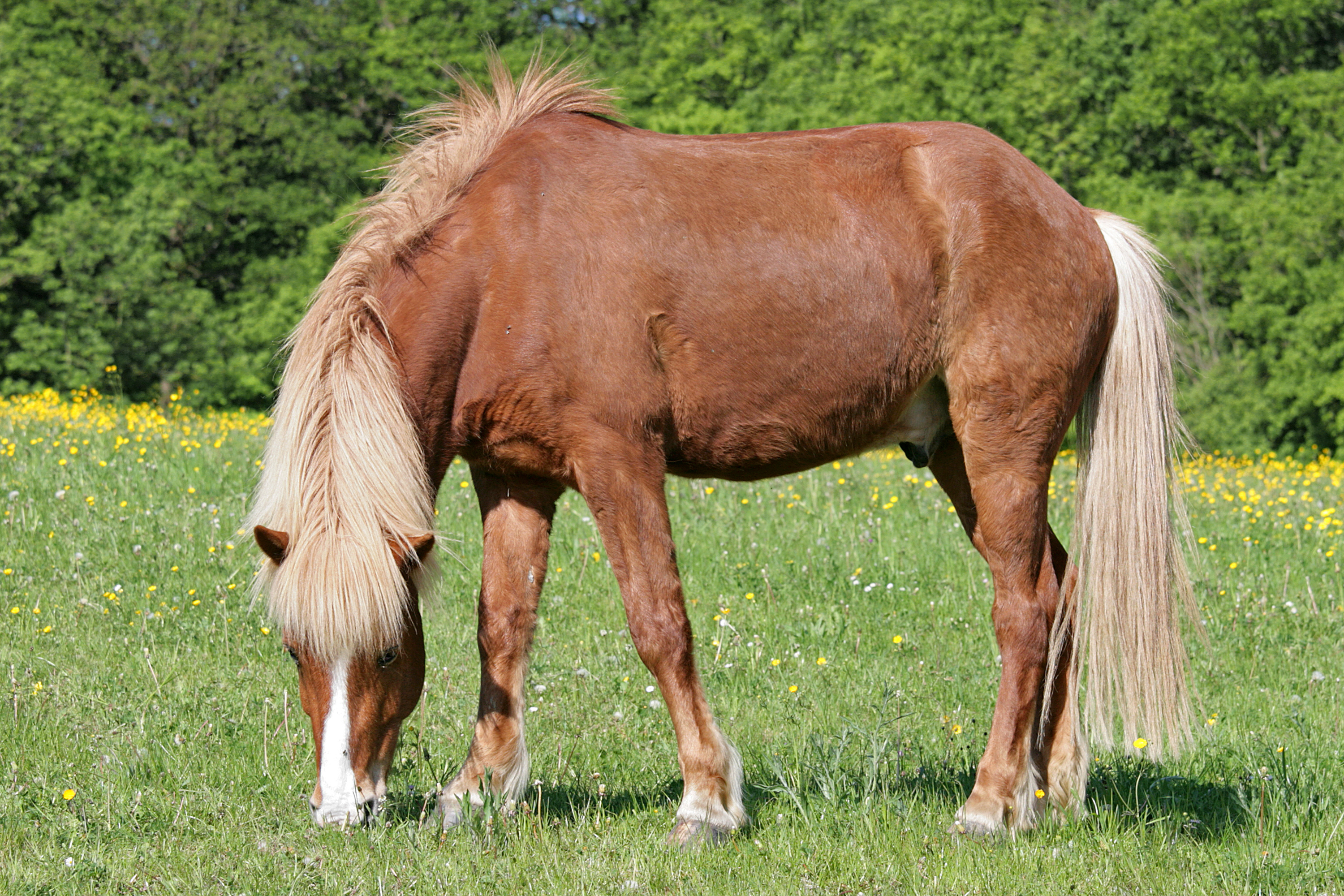 Islandpferd in Südwestdeutschland